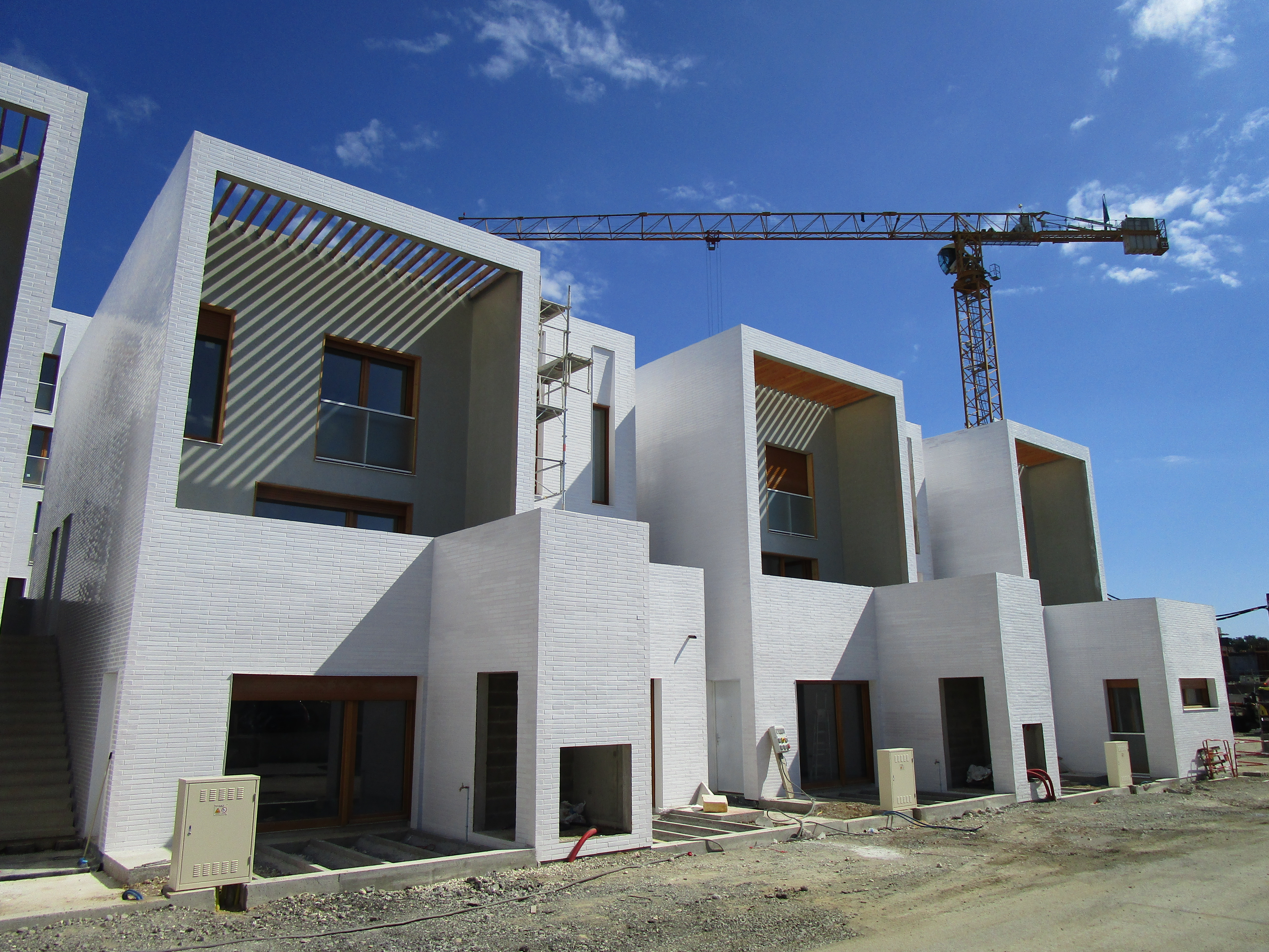 Maisons de l'ensemble du Clos de la chapelle, résidence sociale bâtie en 2018 dans le quartier Monconseil de Tours